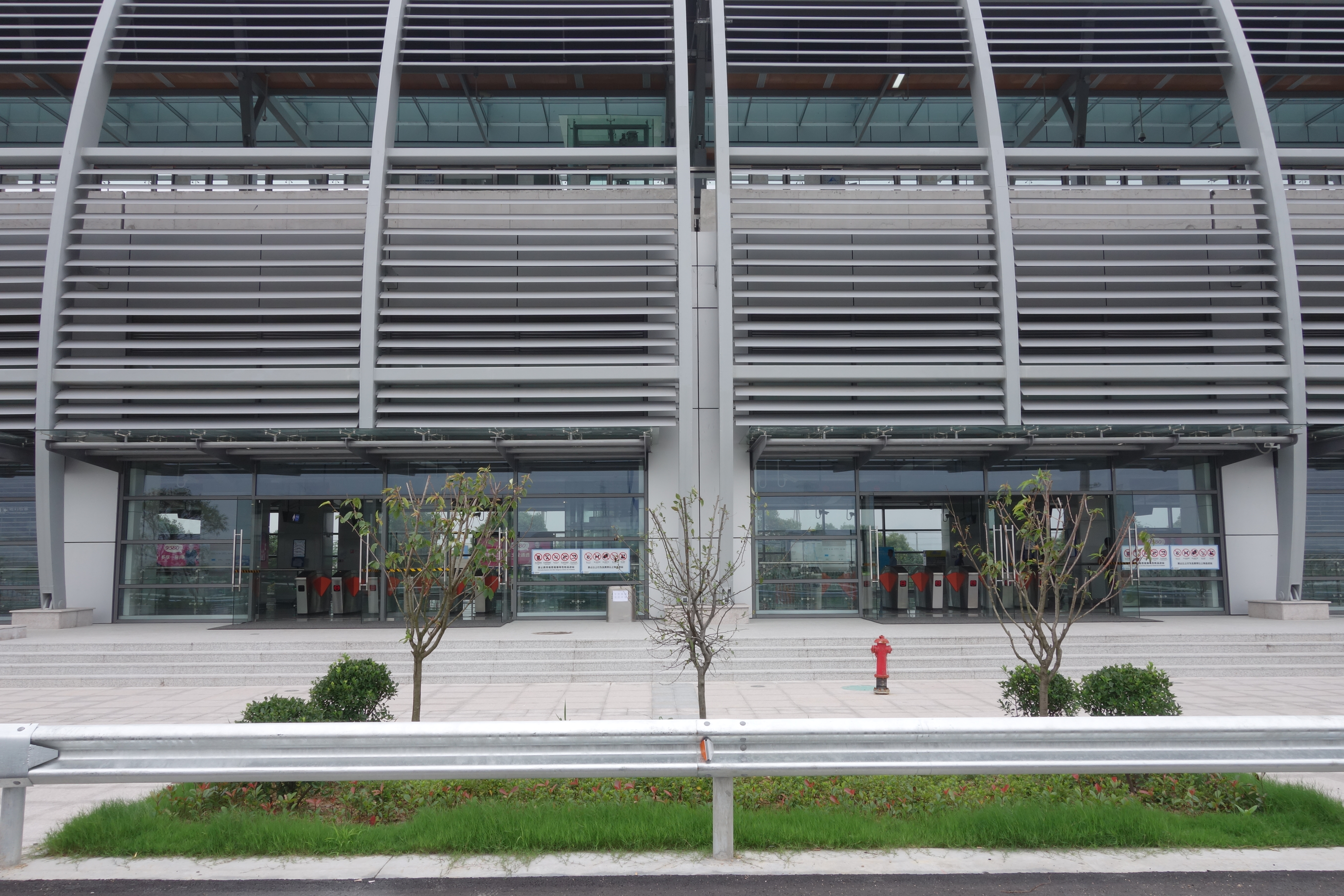 高桥西站进站口